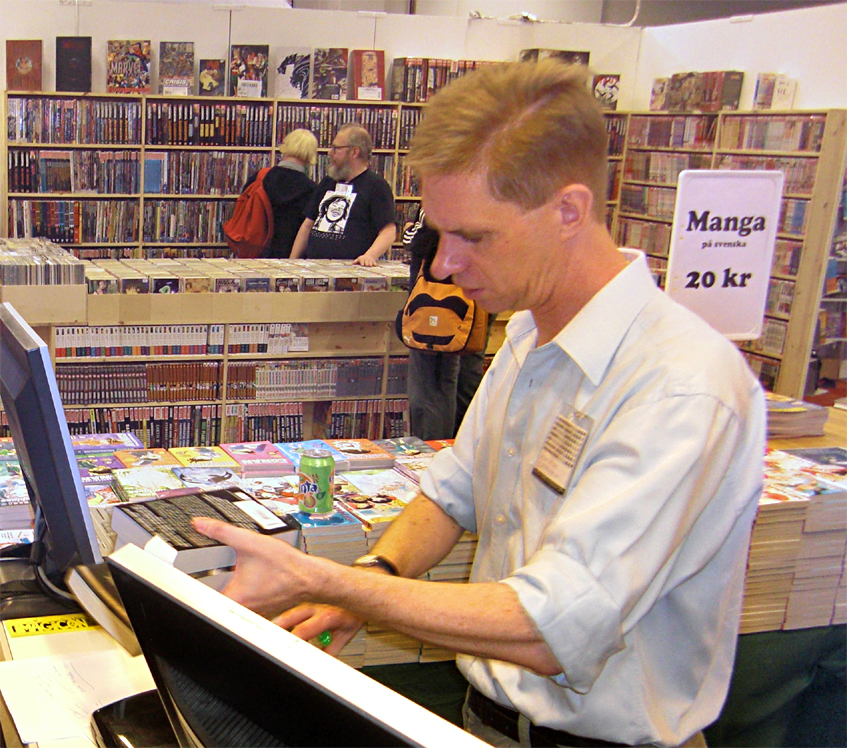 Johan Frick (1965–2015) i Science Fiction-bokhandelns monter på Bokmässan. 2009-09-24.